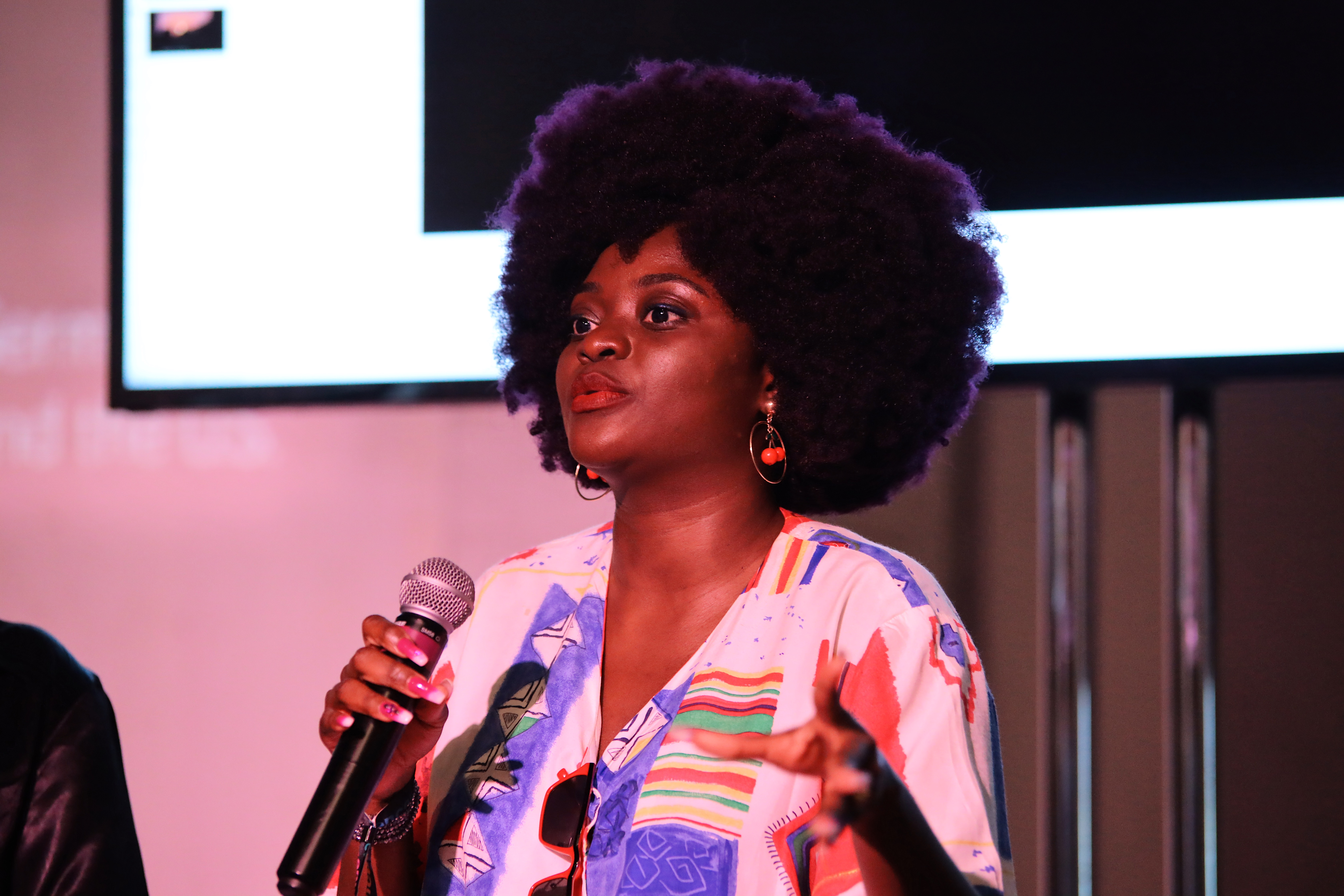 re:publica on Sequencer Tour